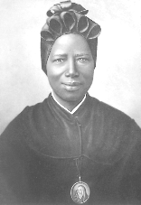 autore: Brunel Scattata nel 1933 a Venezia